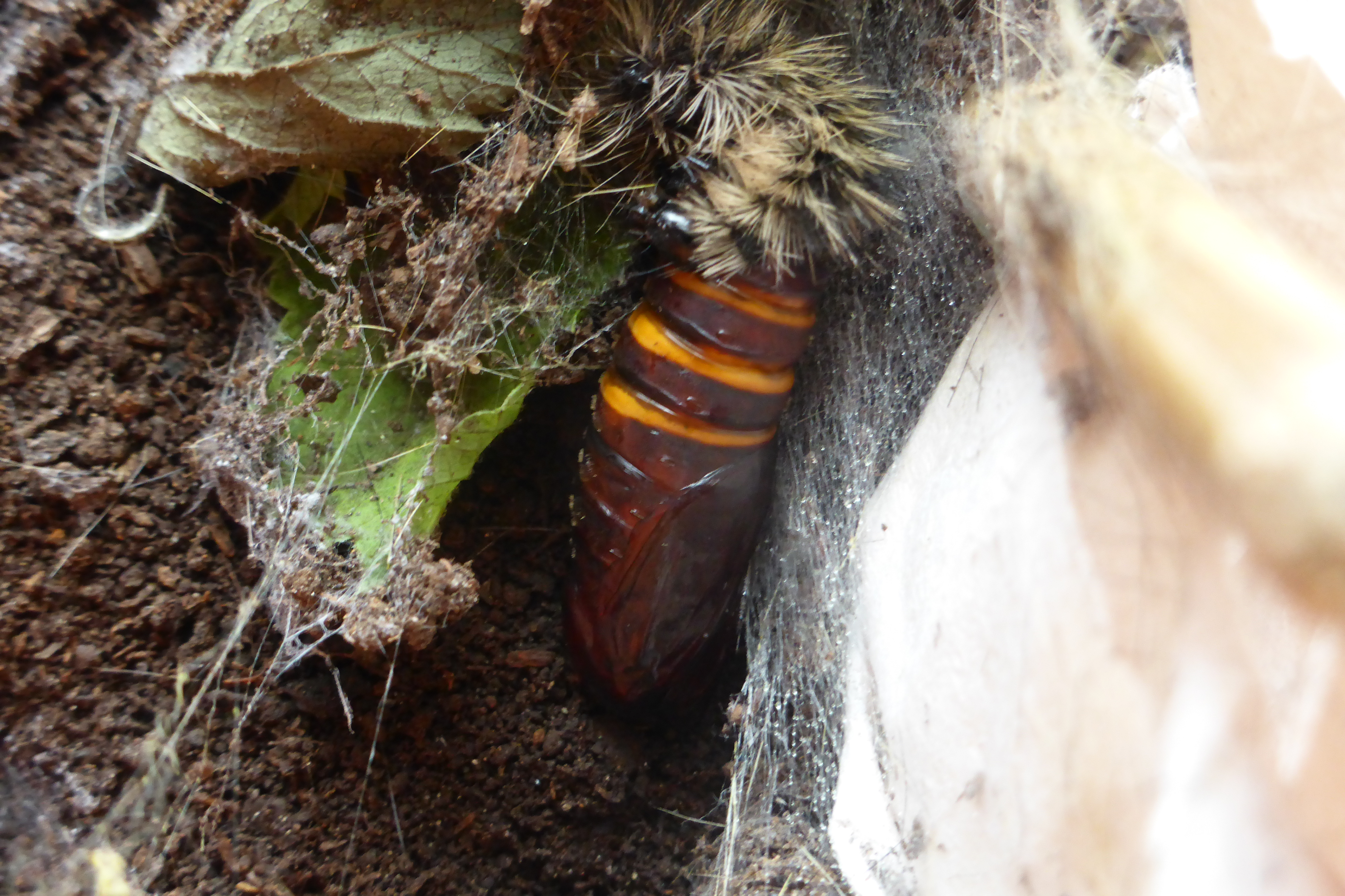 Куколка медведицы желтой (Arctia flavia)